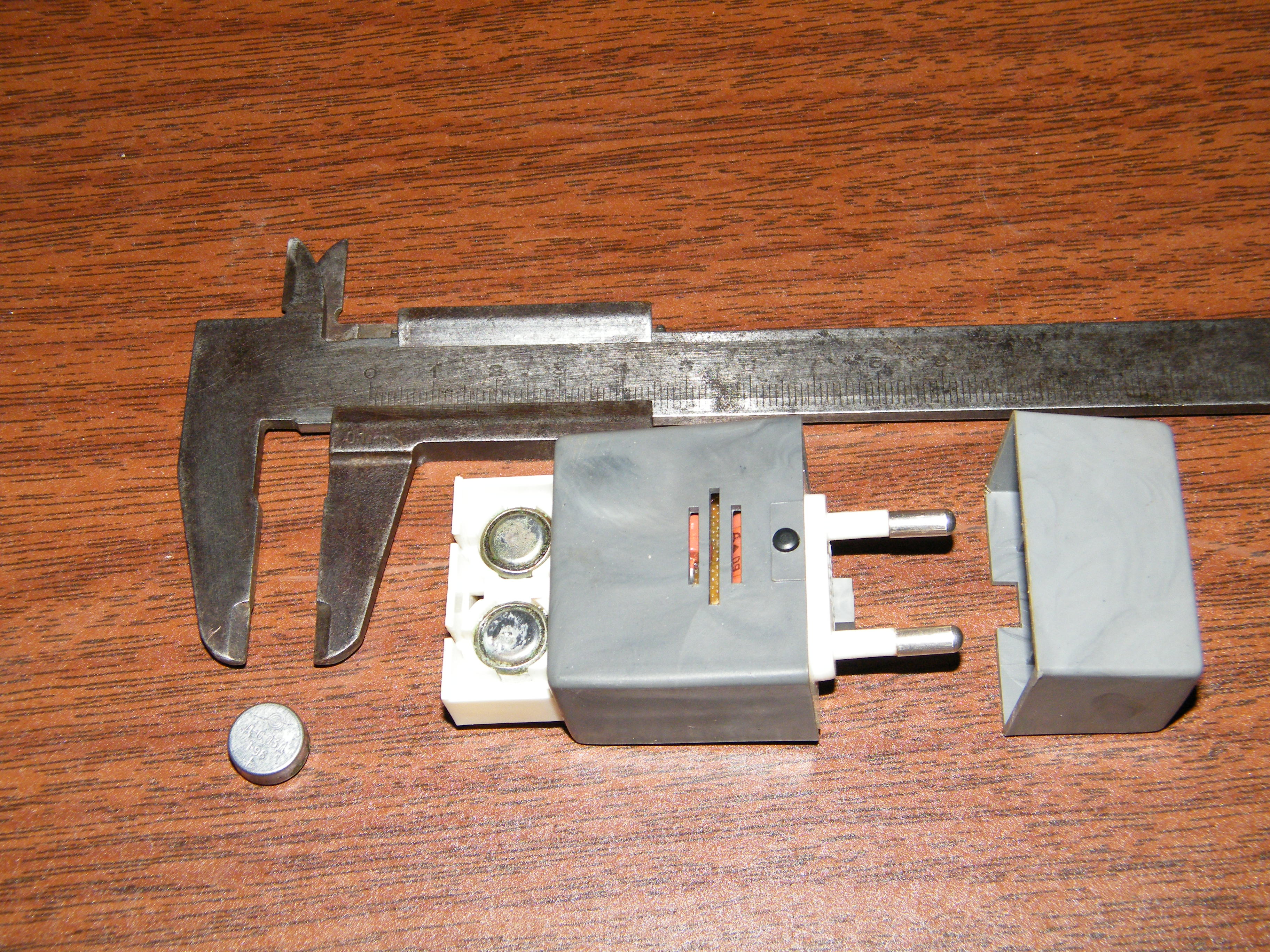 Малогабаритные дисковые никель-кадмиевые аккумуляторы Д-0,03 и зарядное устройство к ним. Аккумуляторы применялись в фотоаппаратуре, слуховых аппаратах, миниатюрных электронных устройствах. СССР, 1980-е годы.